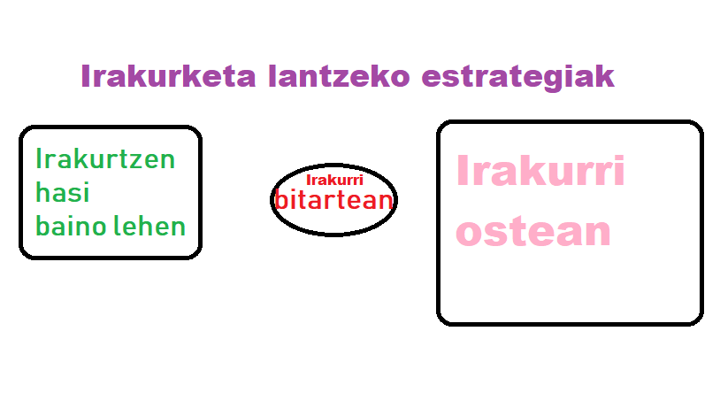 Irakurtzeko hainbat estrategia erabil daitezke. Bai irakurketa aurretik girotzeko, bai irakurri bitartean arreta eta ulermena hobetzeko, bai irakurri ostean testuaren ulermena areagotzeko, baieztatzeko.